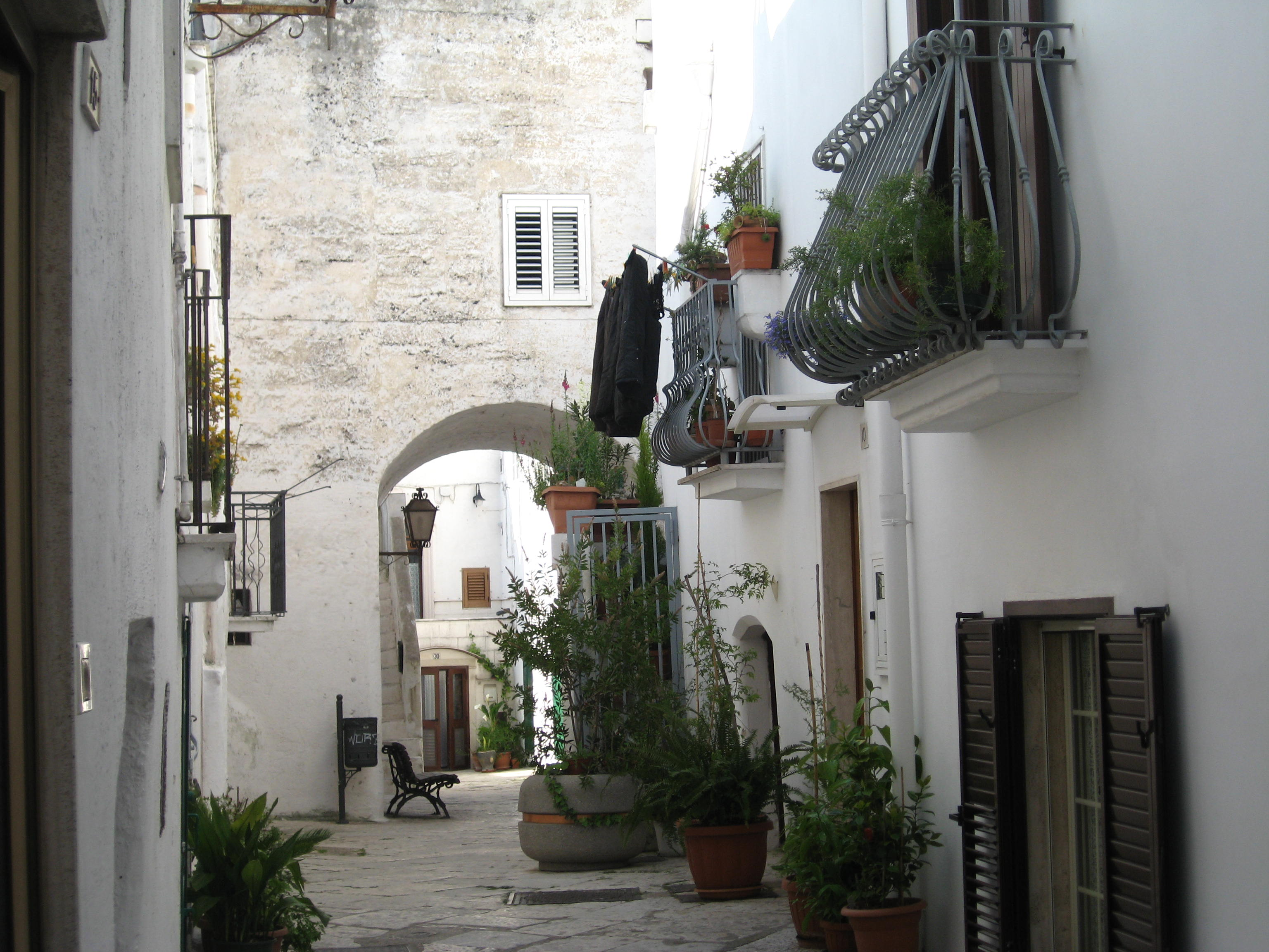 By Stefano Piepoli & Carmine Lentini